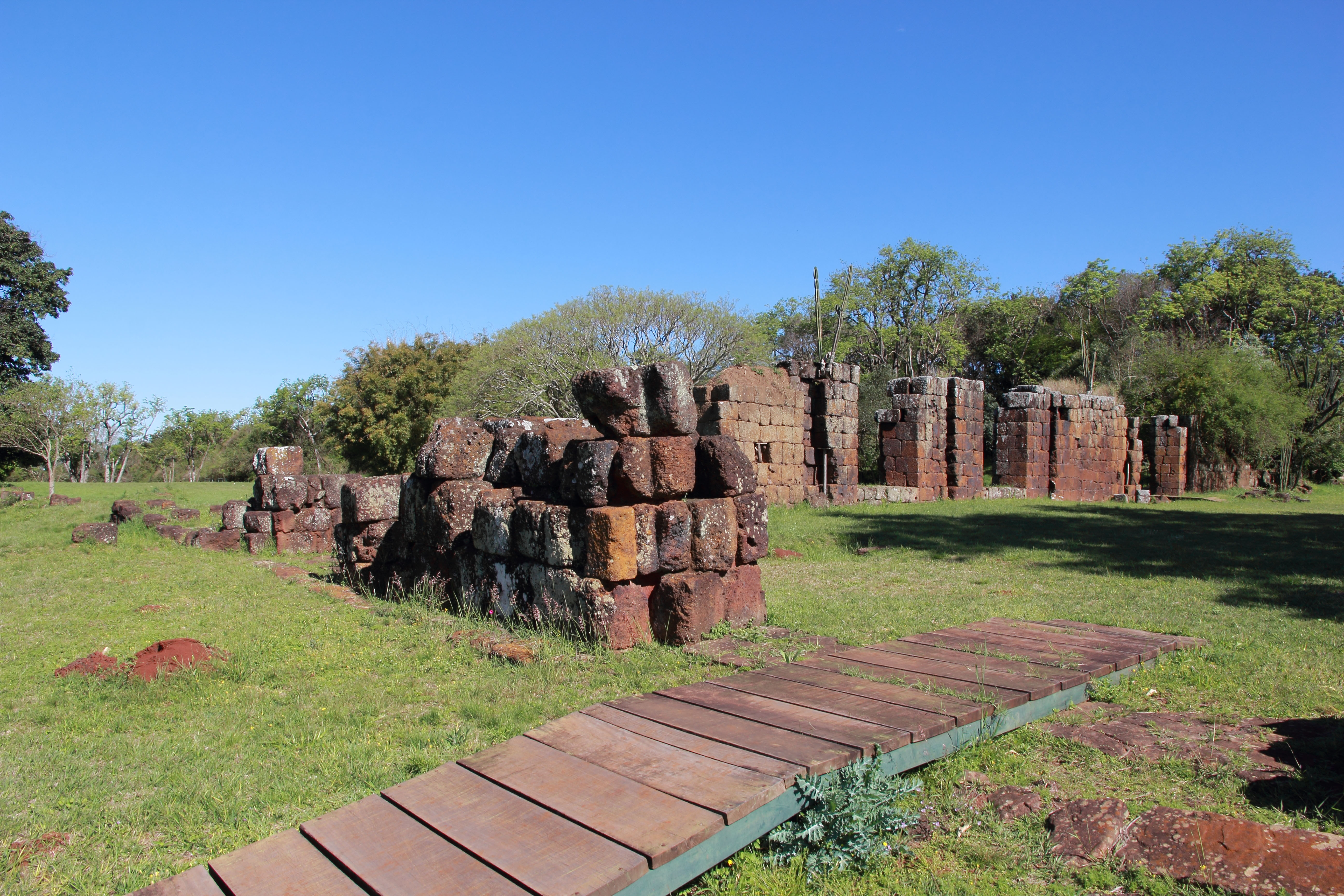 Sítio Arqueológico de São João Batista em Entre-Ijuís, RS.